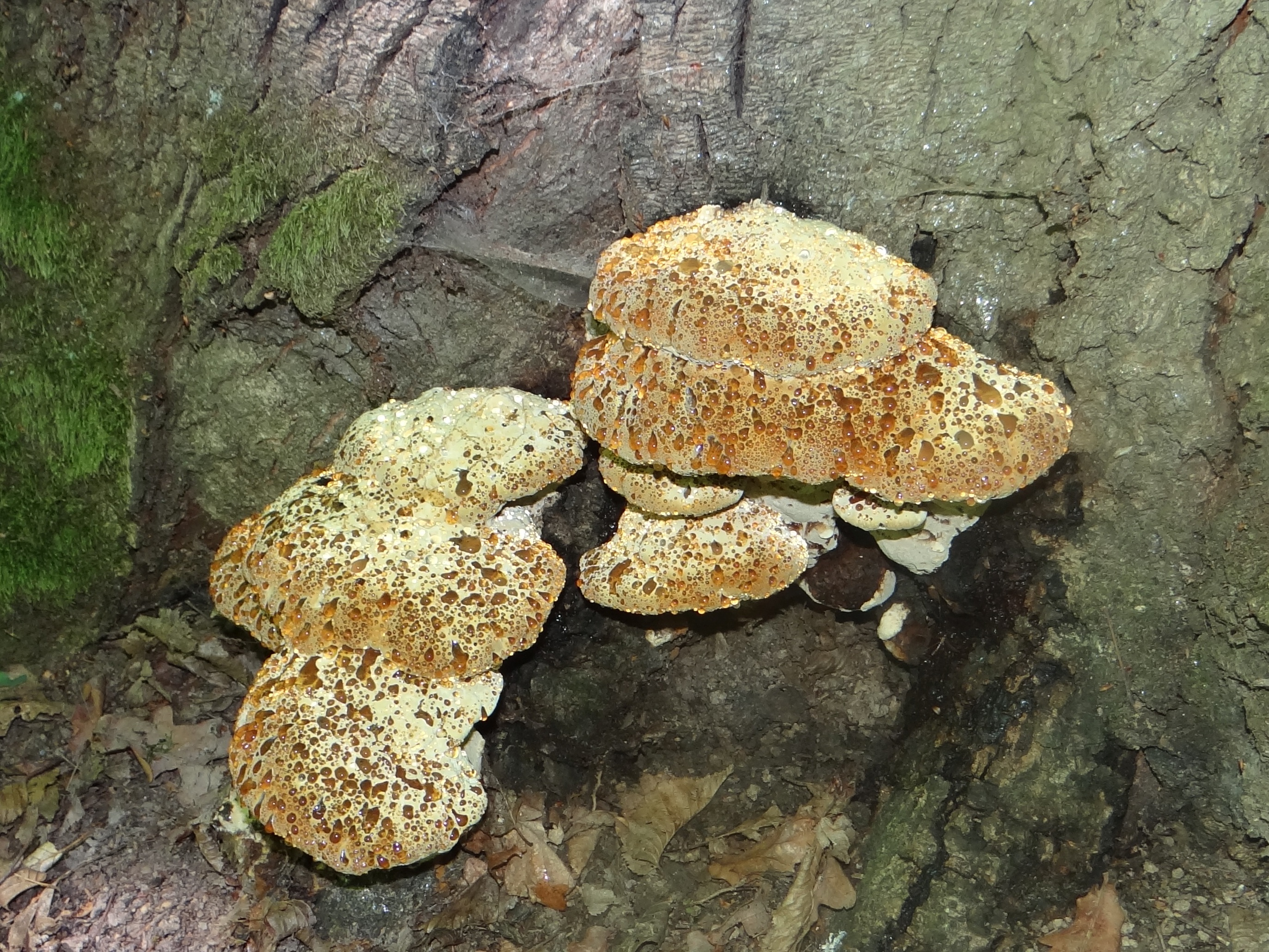 Pseudoinonotus dryadeus. Location: Poland, Puszcza Niepołomicka, rezerwat przyrody "Dębina"